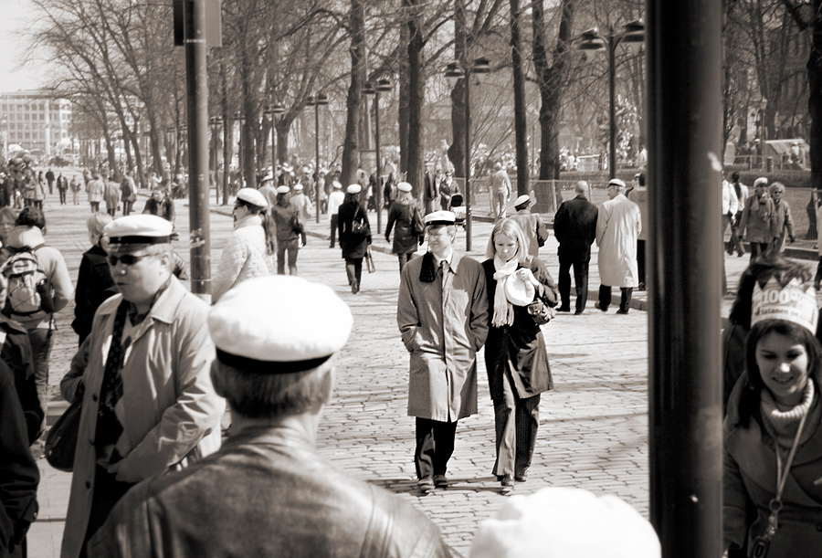 Vappupäivänä 1.5. Pohjois-Esplanadilla Helsingissä